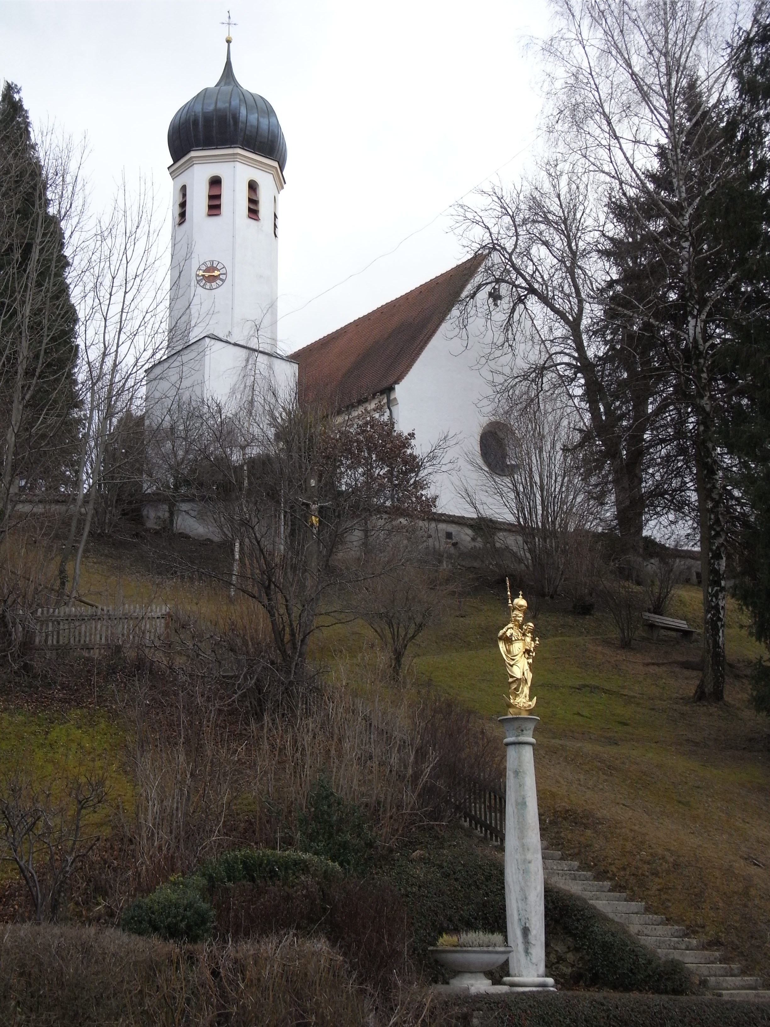 Herrsching am Ammersee, Martinskirche und Mariensäule.